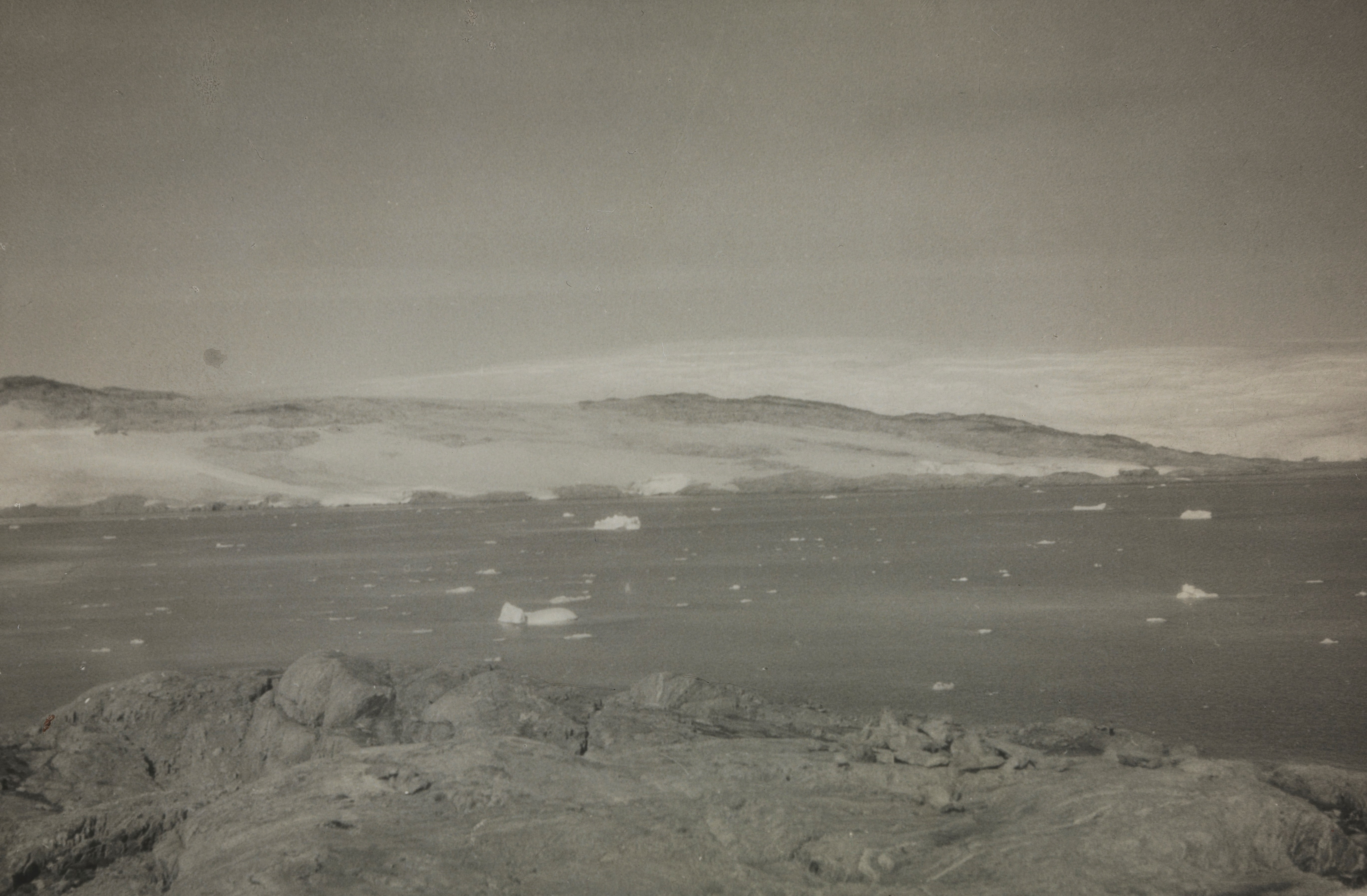 Utsikt over viken mot breen hvor Fridtjof Nansens Grønlandsekspedisjon gikk i land 1888. Depicted place: Grønland, Umivik